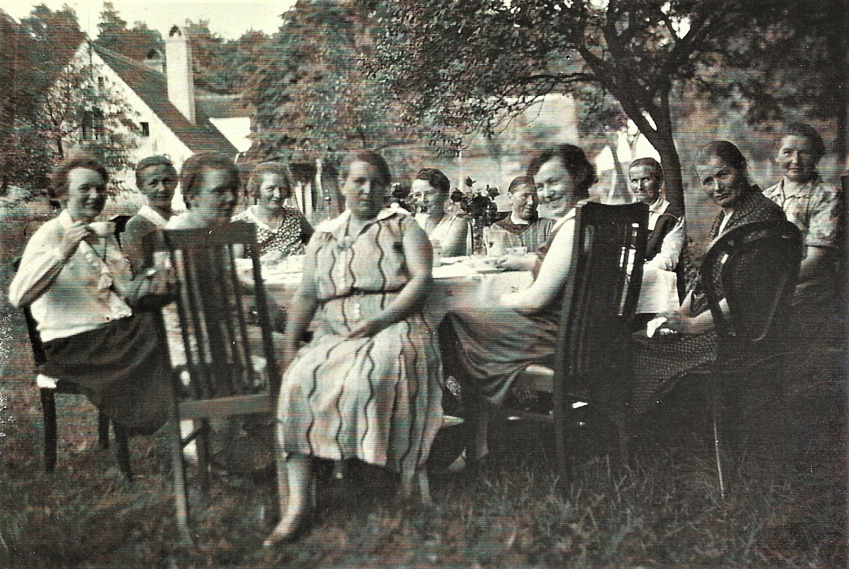 Die Damenkreise in Sorau veranstalteten Kaffeerunden und priesen die Sorauer Kaffeeservice an.